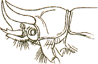 This file has been extracted from another file: Jacobs27.jpg